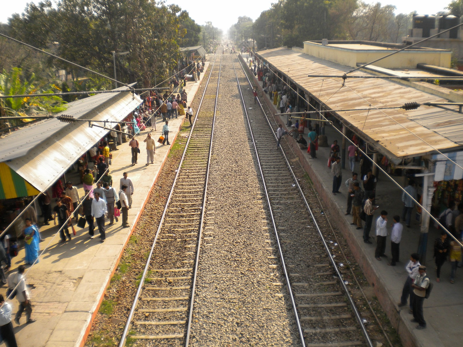 BAGULA RAILWAY STATION